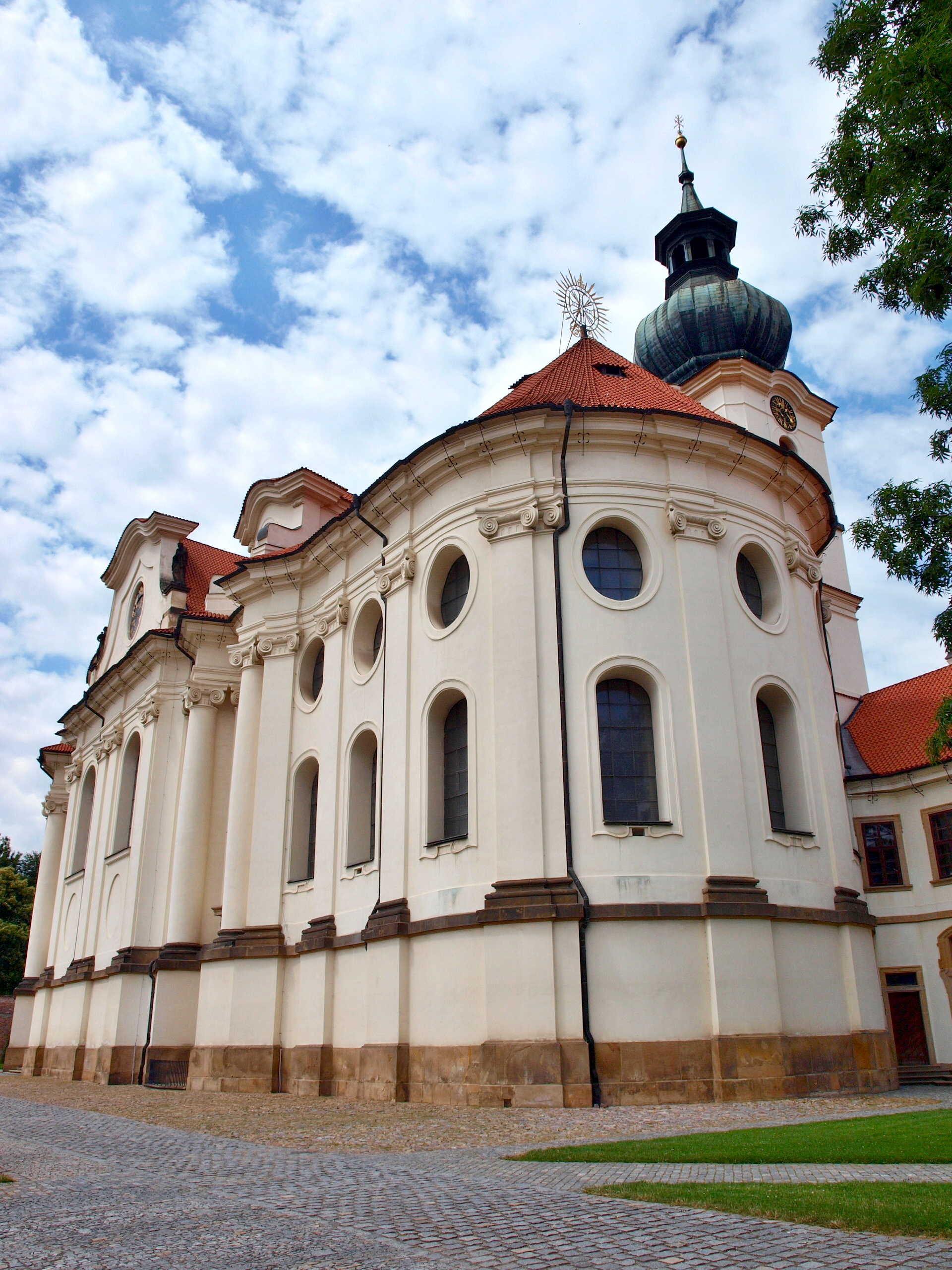 Břevnovská klášterní bazilika sv. Markéty